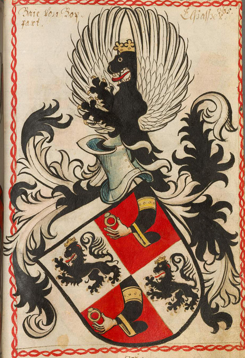 Scheibler'sches Wappenbuch , älterer Teil; Seite 365 Baie von Boppart Elsässer